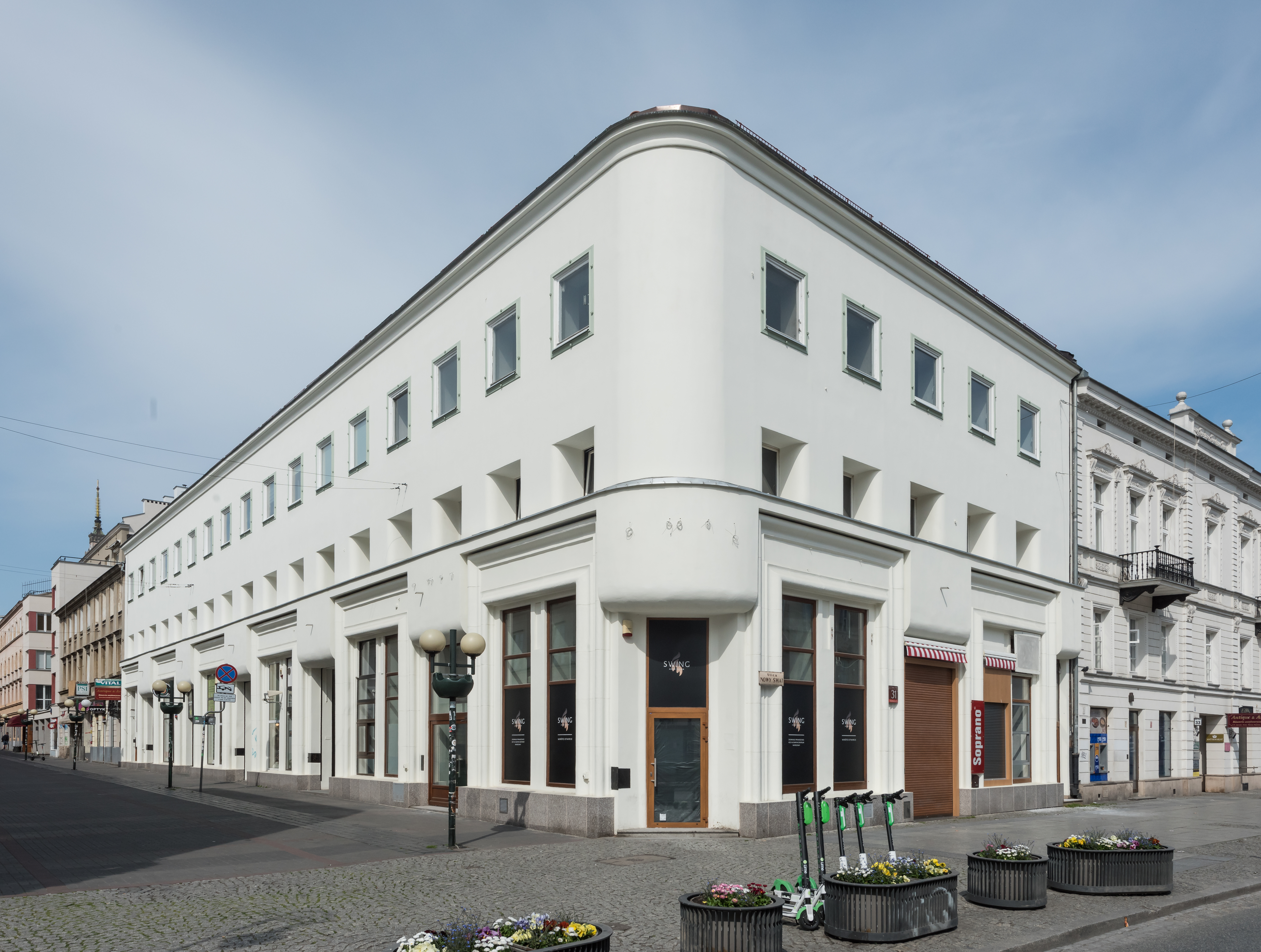 Dom Pod Biustonoszami przy ul. Nowy Świat 31 w Warszawie